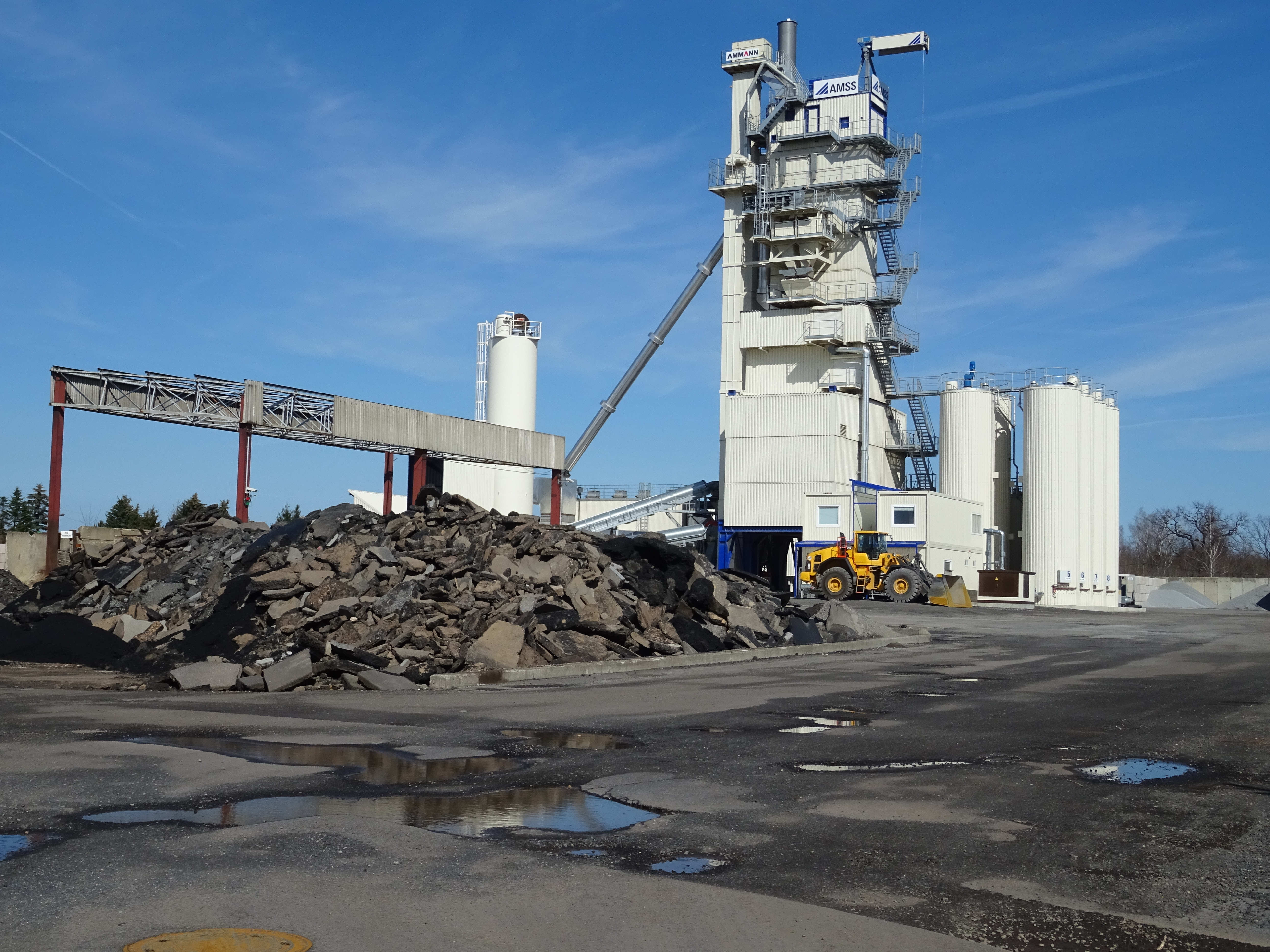 Hellerberge, Hellersiedlung am 16. März 2019, Asphaltmischanlage